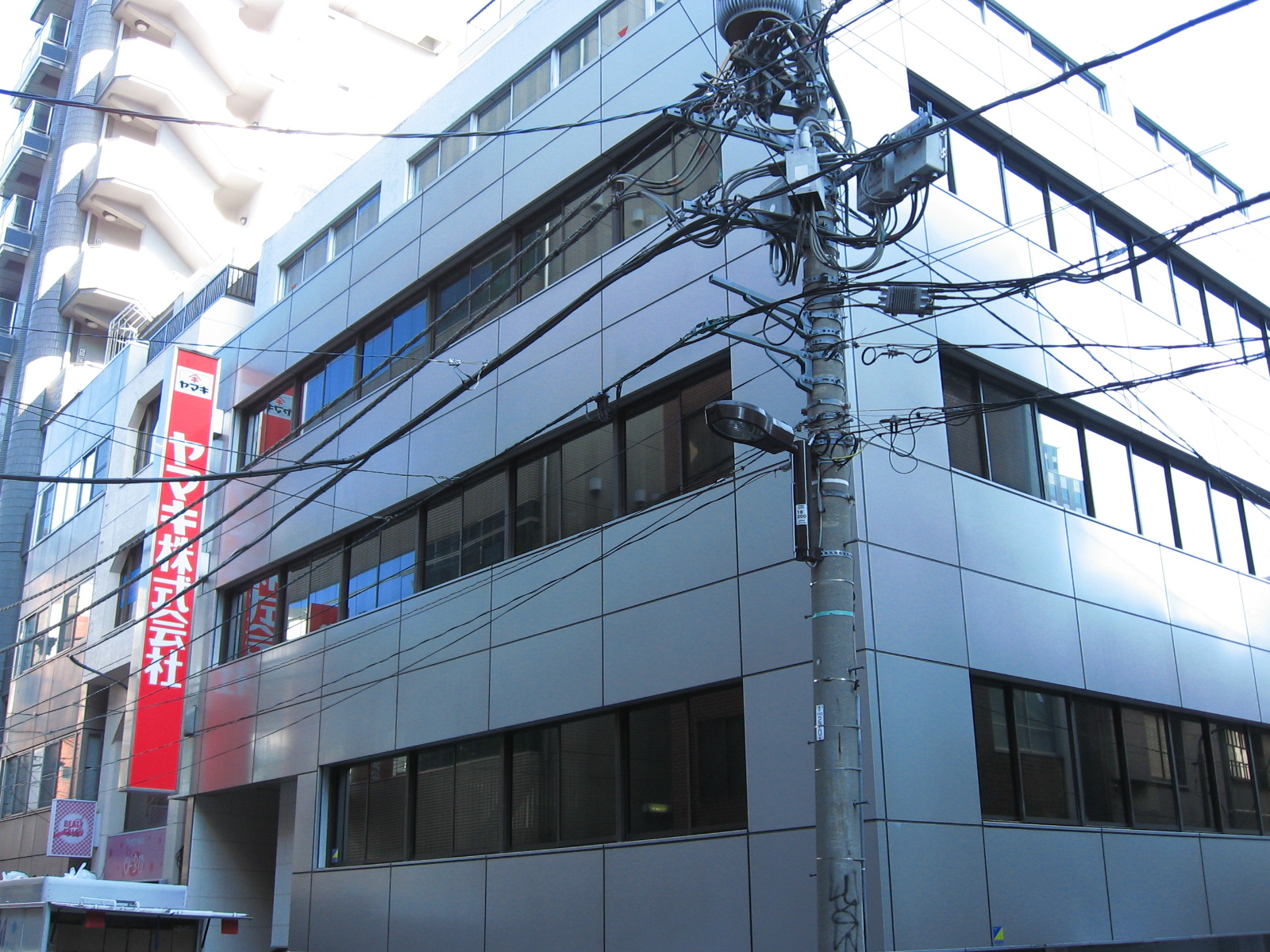 ヤマキ東京支社（東京都千代田区外神田）。